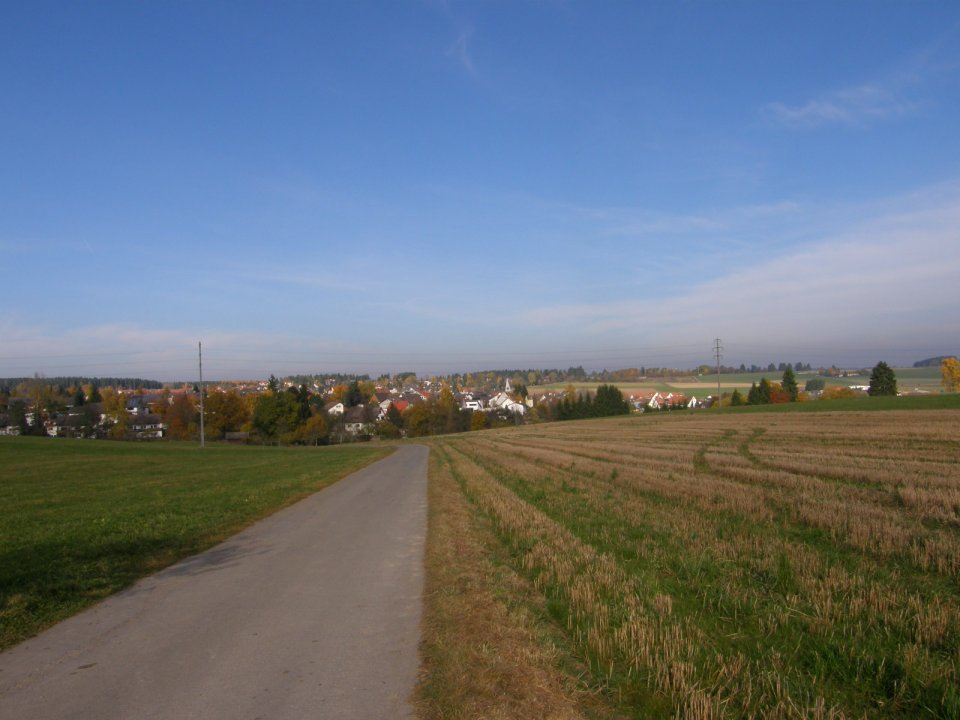 Pfaffenweiler, Stadtteil von Villingen-Schwenningen